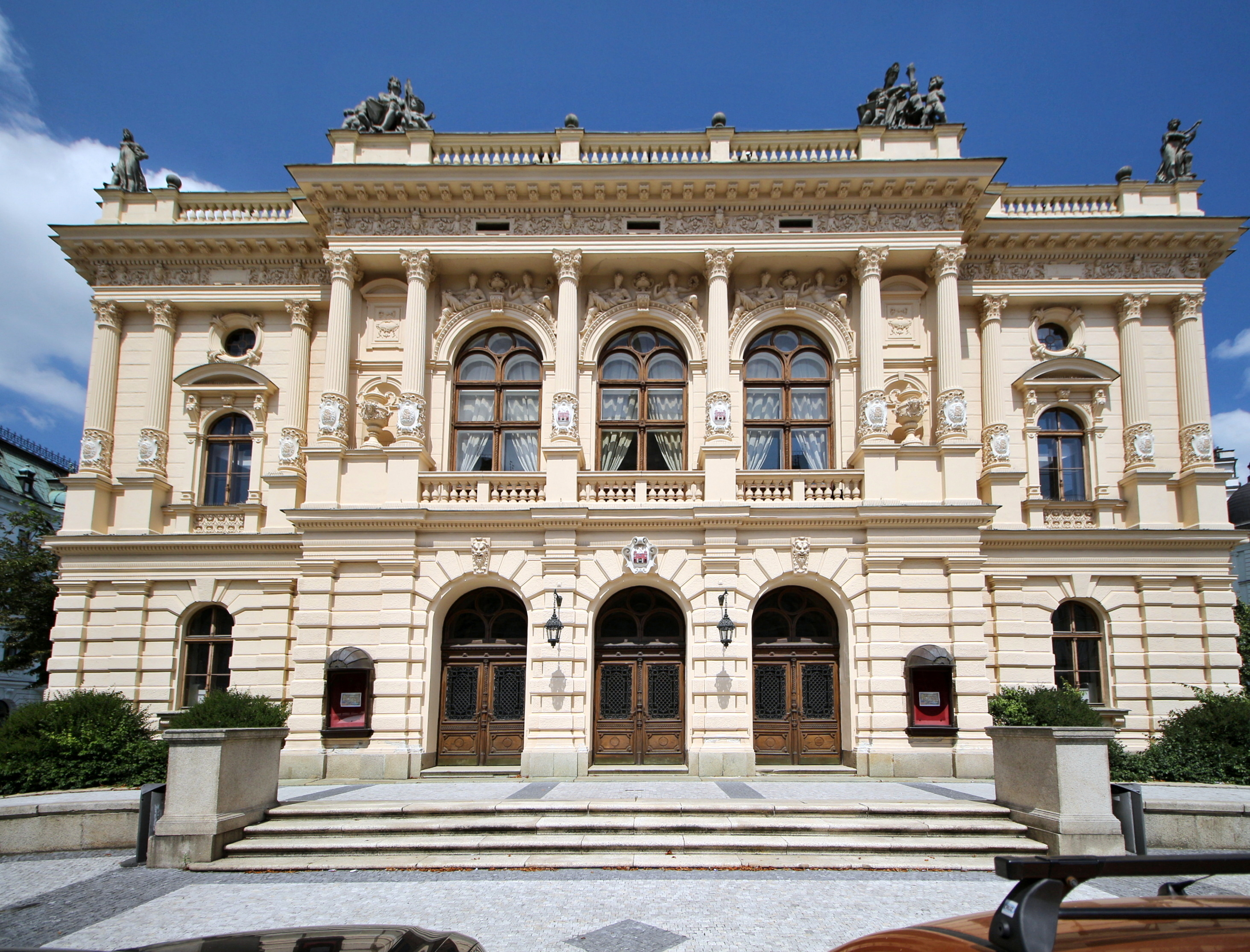 Liberecké Divadlo F. X. Šaldy